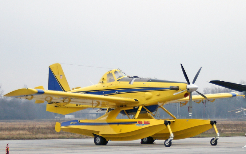 Air Tractor, Zagreb